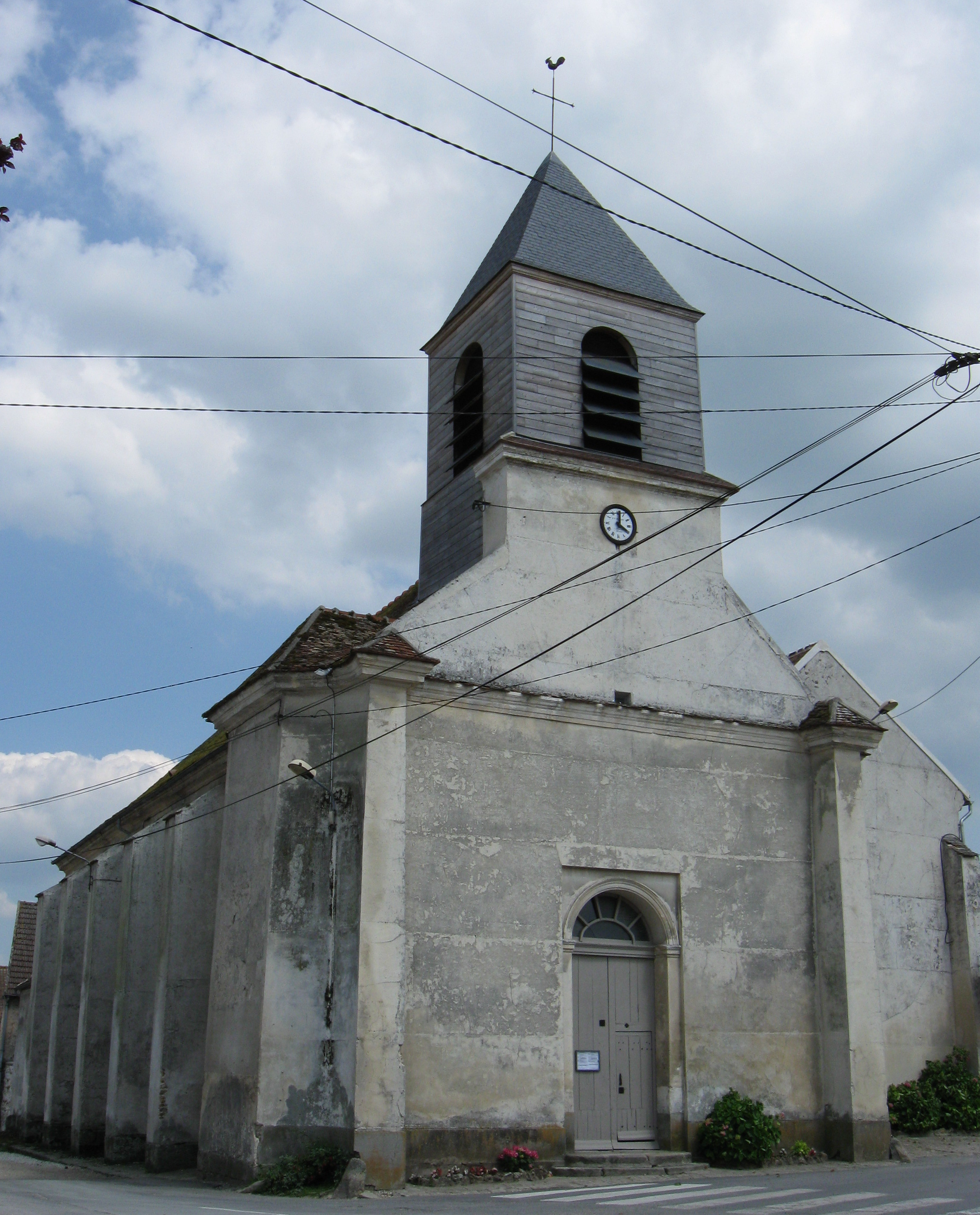 Église de la Sainte Vierge de Signy-Signets. (département de la Seine-et-Marne, région Île-de-France).